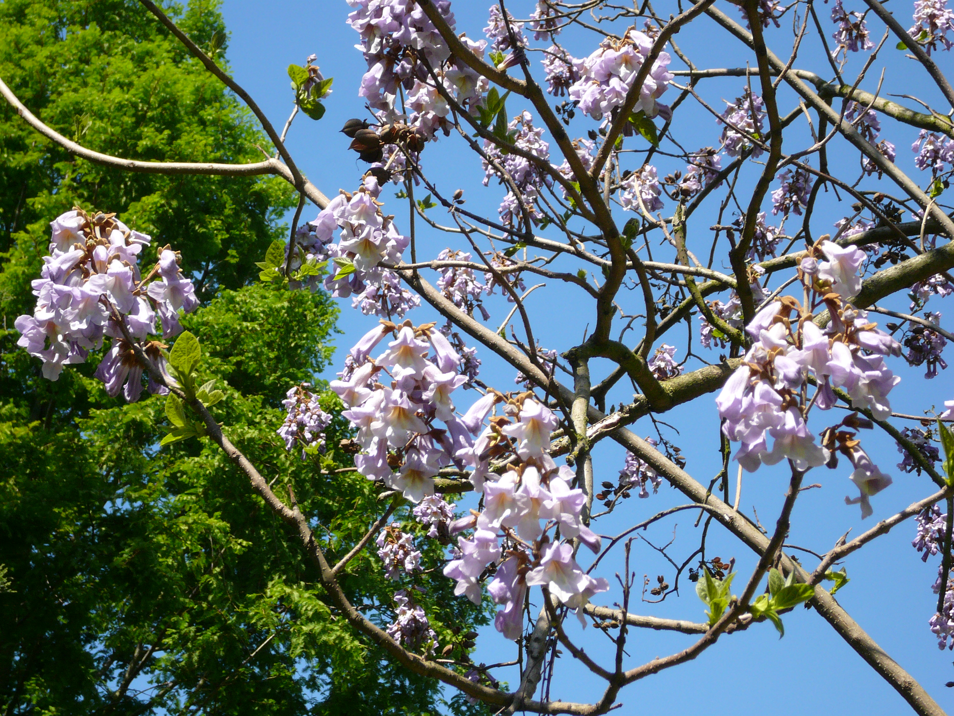 Paulownia tomentosa (detail)